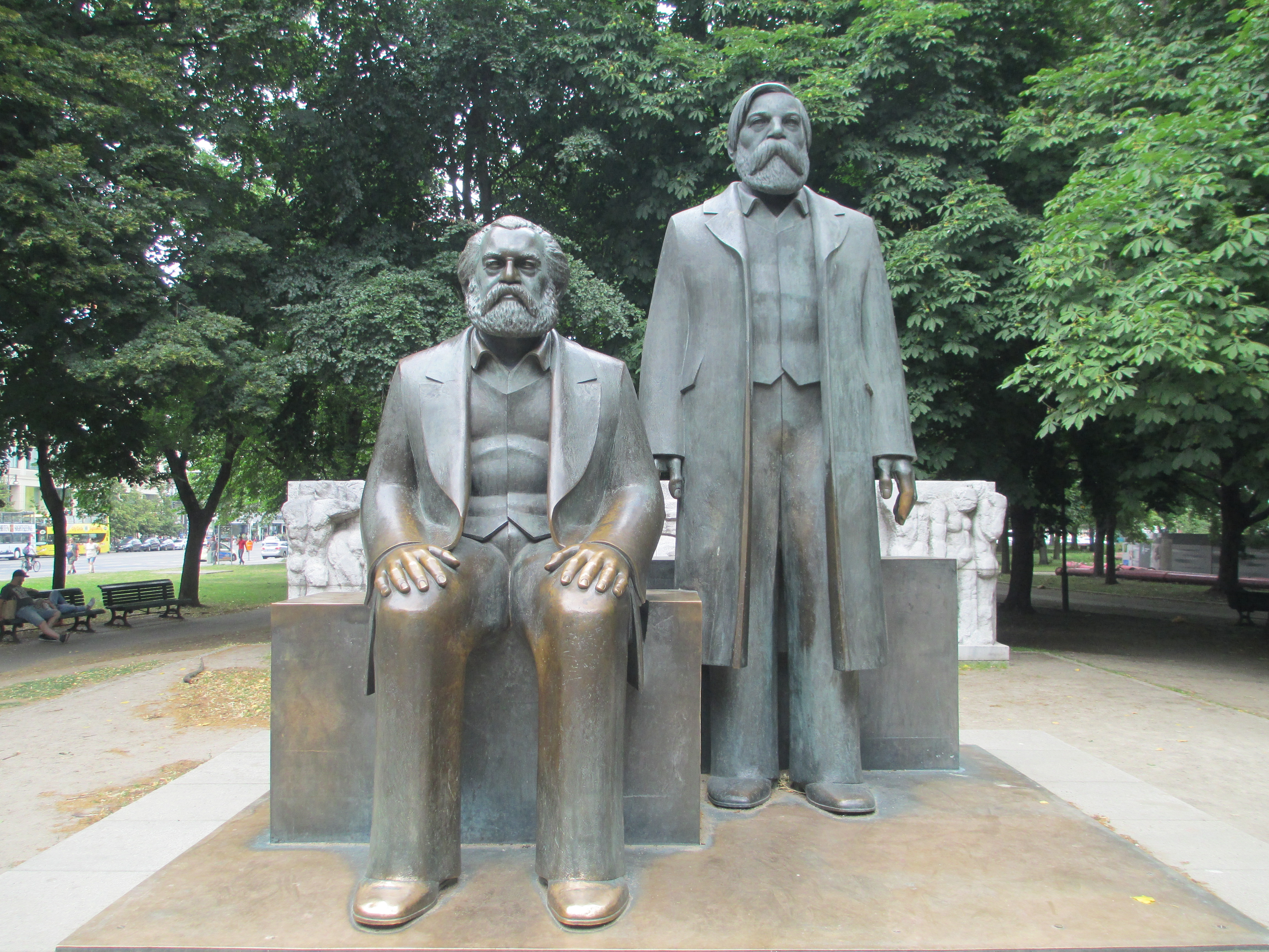 פסל של מרקס (משמאל) ואנגלס בברלין